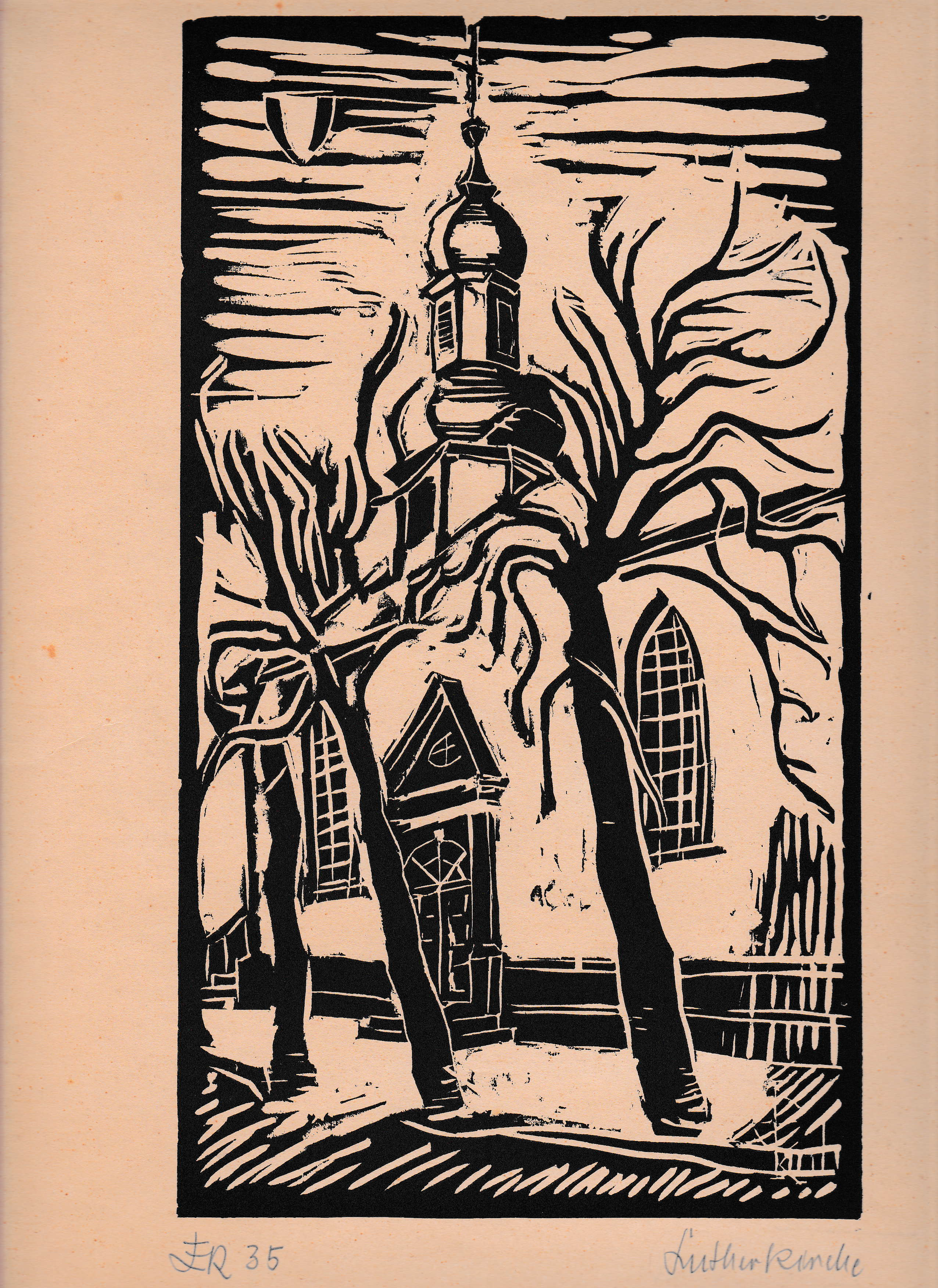 Linoldruck